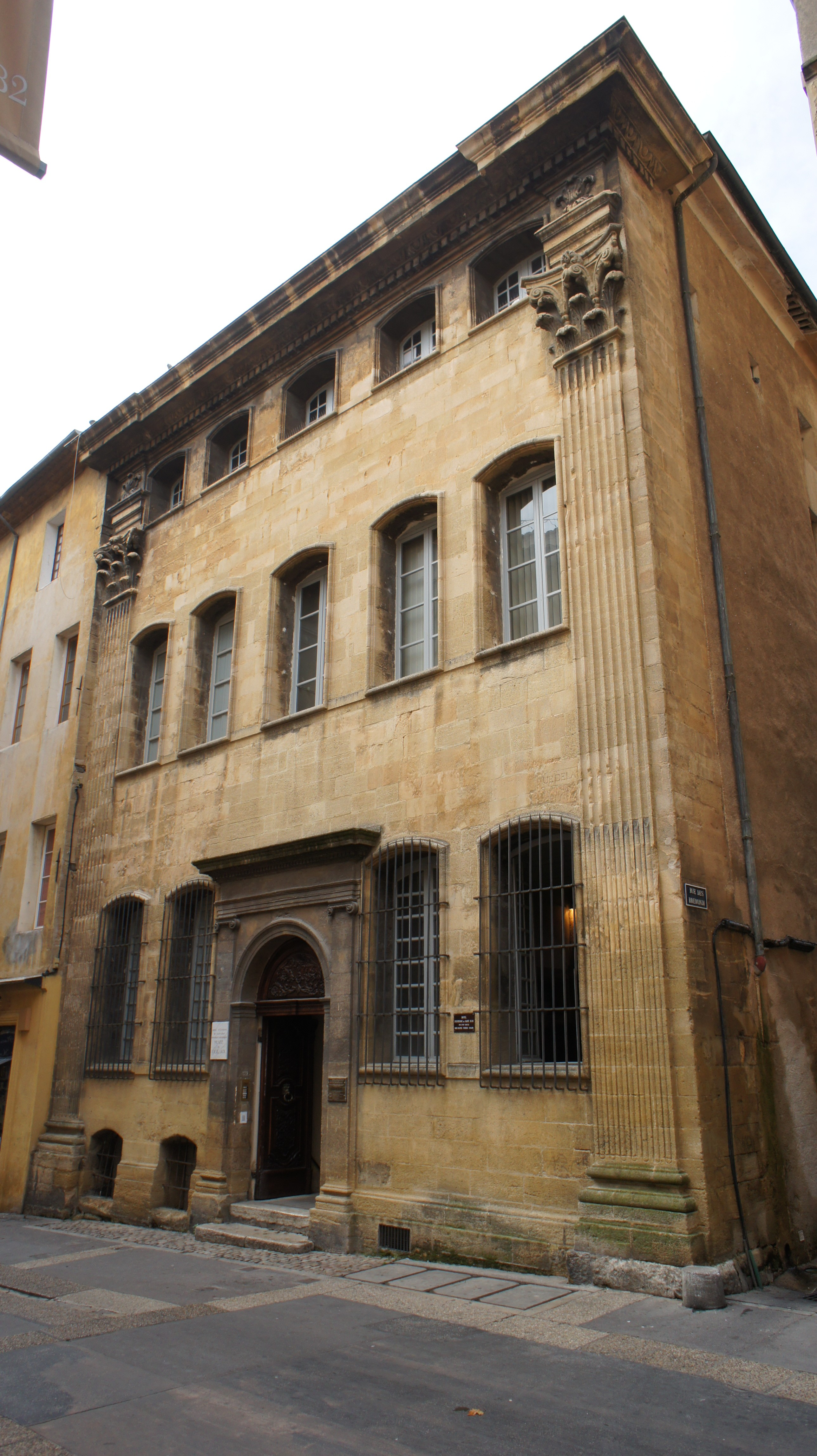 Façade complète de l'hôtel d'Estienne-de-Saint-Jean, à Aix-en-Provence .